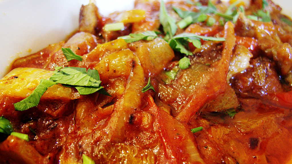 Mućkalica